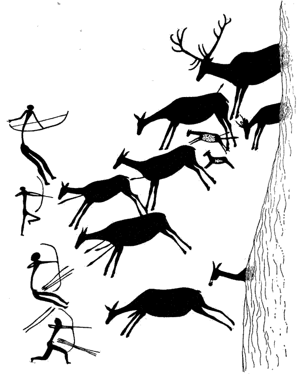 Escena de caza de ciervas. Pintura mural de la Cueva de los Caballos del Barranco de Valltorta, provincia de Castellón, en el este de España.